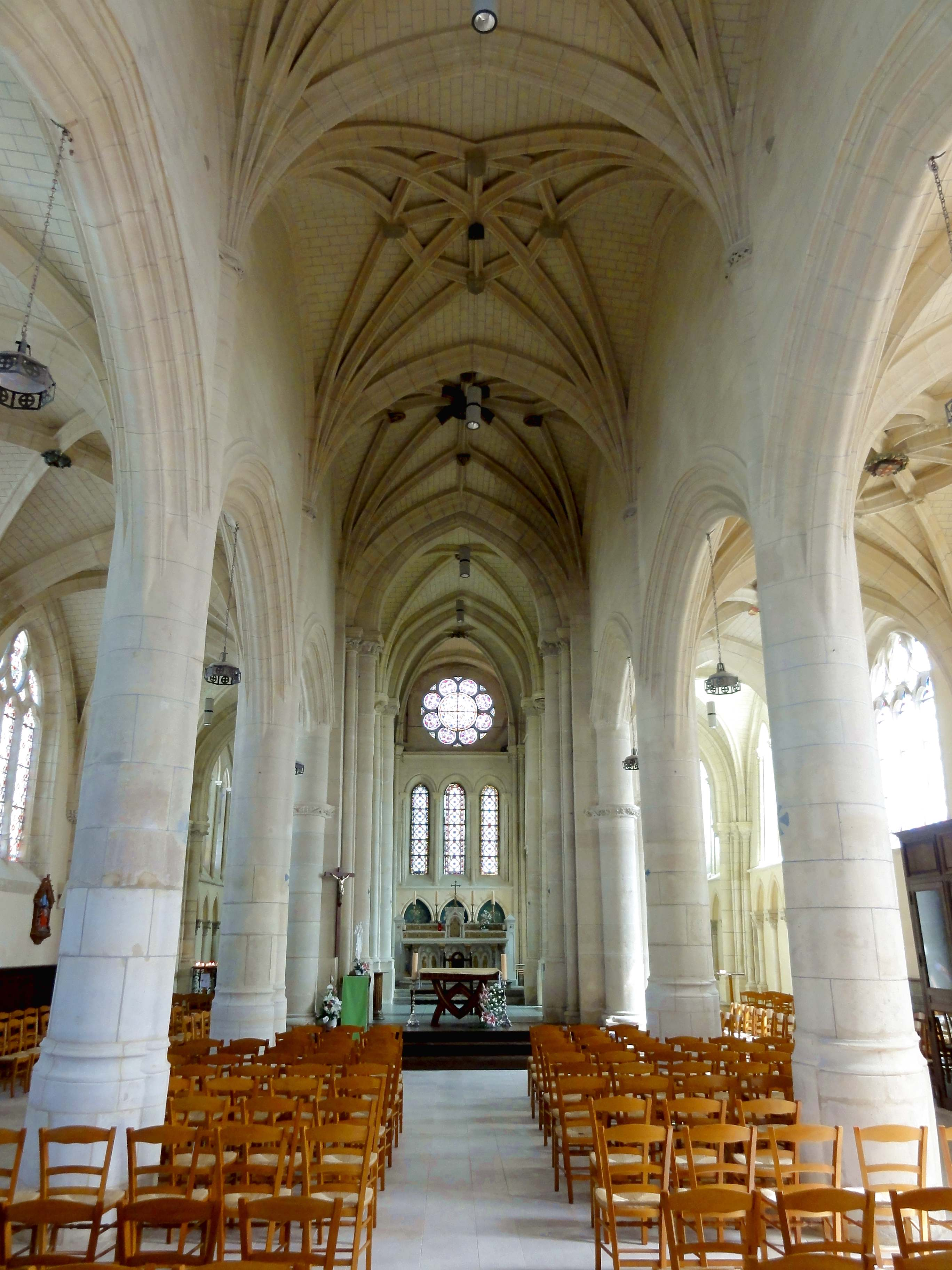 Intérieur de l'église - voir titre.